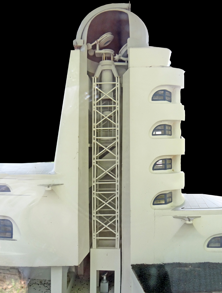 Détail de la maquette de la tour Einstein (Einsteinturm) montrant le système optique Leibniz-Institut für Astrophysik Potsdam Allemagne Cet édifice (de style qualifié d'expressionniste) est un observatoire du rayonnement solaire doté d'un important télescope et d'appareils de spectrographie, destinés initialement à la vérification de la théorie de la relativité d'Einstein. Le bâtiment a été conçu par l'architecte allemand Erich Mendelsohn, et construit entre 1920 et 1922. Sa mise en service date de 1924. Il a été restauré à plusieurs reprises, en 1958, 1964, 1974-1978 et 1984, il est encore utilisé de nos jours. Il est situé sur la colline Telegrafenberg au sud de Potsdam dans le parc de l'observatoire. Erich Mendelsohn (1887-1953) est un des plus importants architectes allemands du XXè siècle. Il a notamment construit la Columbus-Haus, sur le Potsdamer Platz entre 1930 et 1932, un immeuble de bureaux et de commerces de 9 étages, très moderne pour l'époque. Incendié lors du soulèvement populaire de juin 1953 en RDA, il a été détruit en 1961. Il a du fuir l'Allemagne en 1933 pour échapper aux persécutions des nazis envers les juifs. Il a émigré d'abord au Royaume-Uni, puis en Palestine pour se fixer aux USA en 1941. Article de Wikipedia sur l'architecte